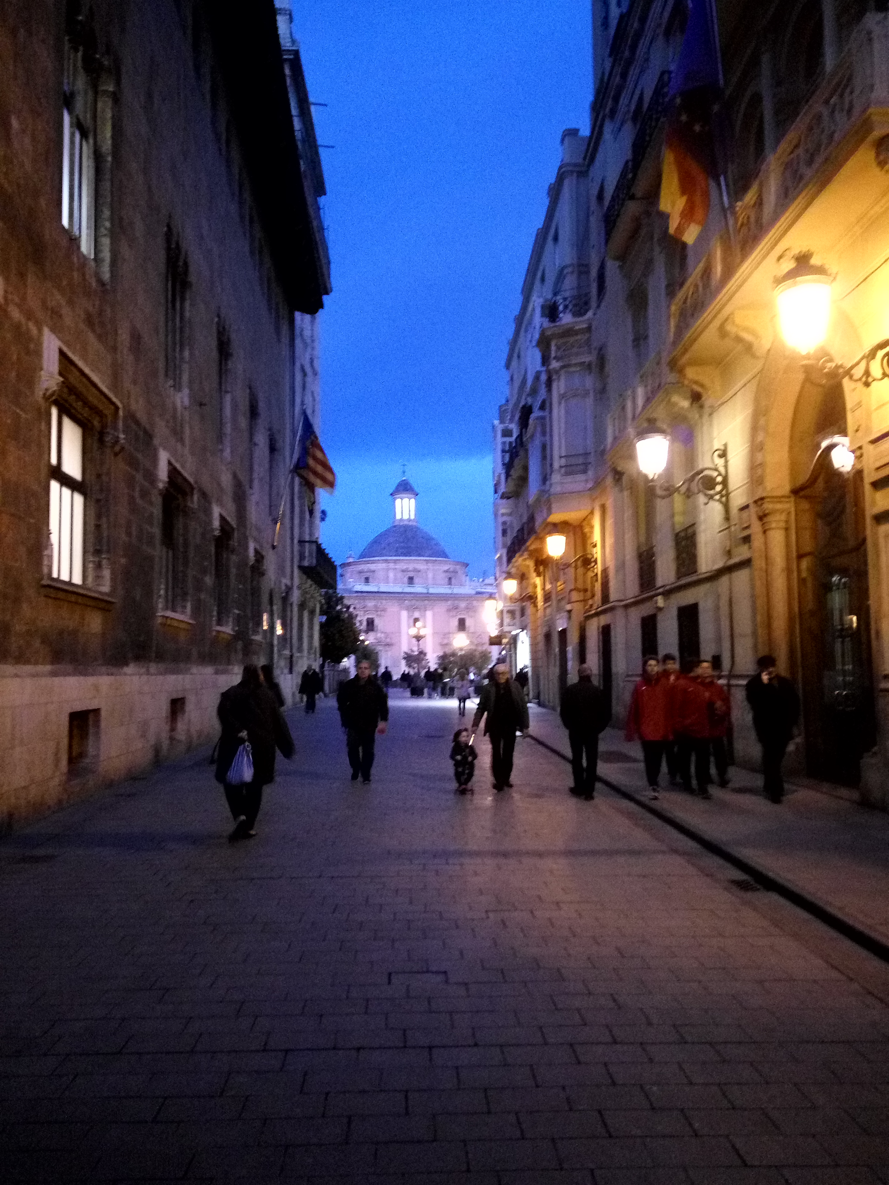 Calle Caballeros de Valencia. Al fondo la basílica de los Desamparados. A la izquierda el Palacio de la Generalidad